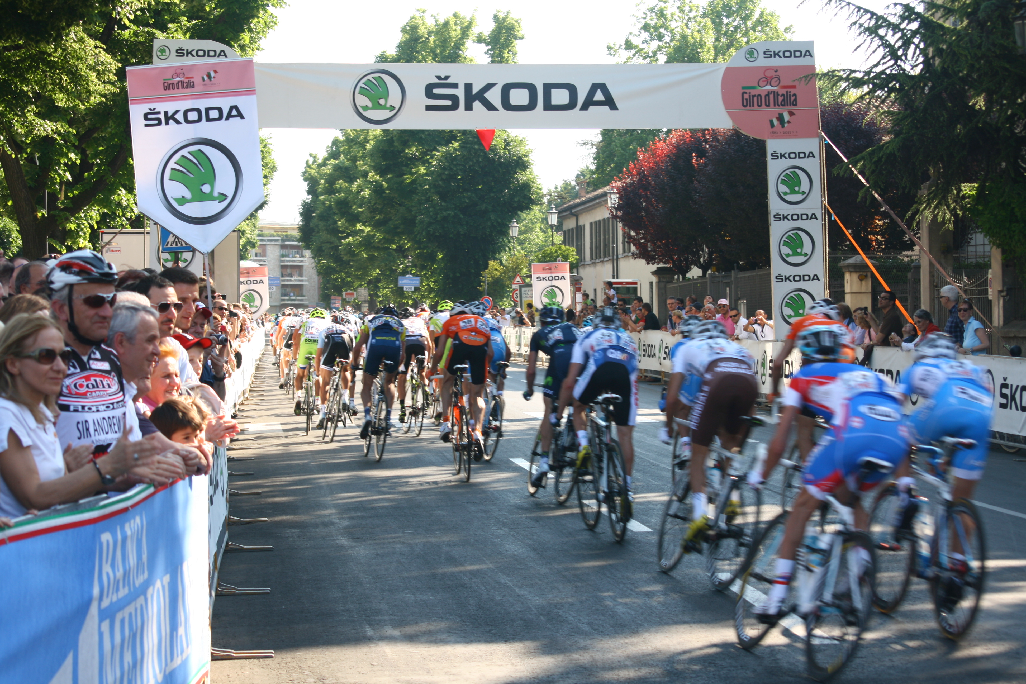 Giro d'Italia 2011, 2a tappa, Alba - Parma